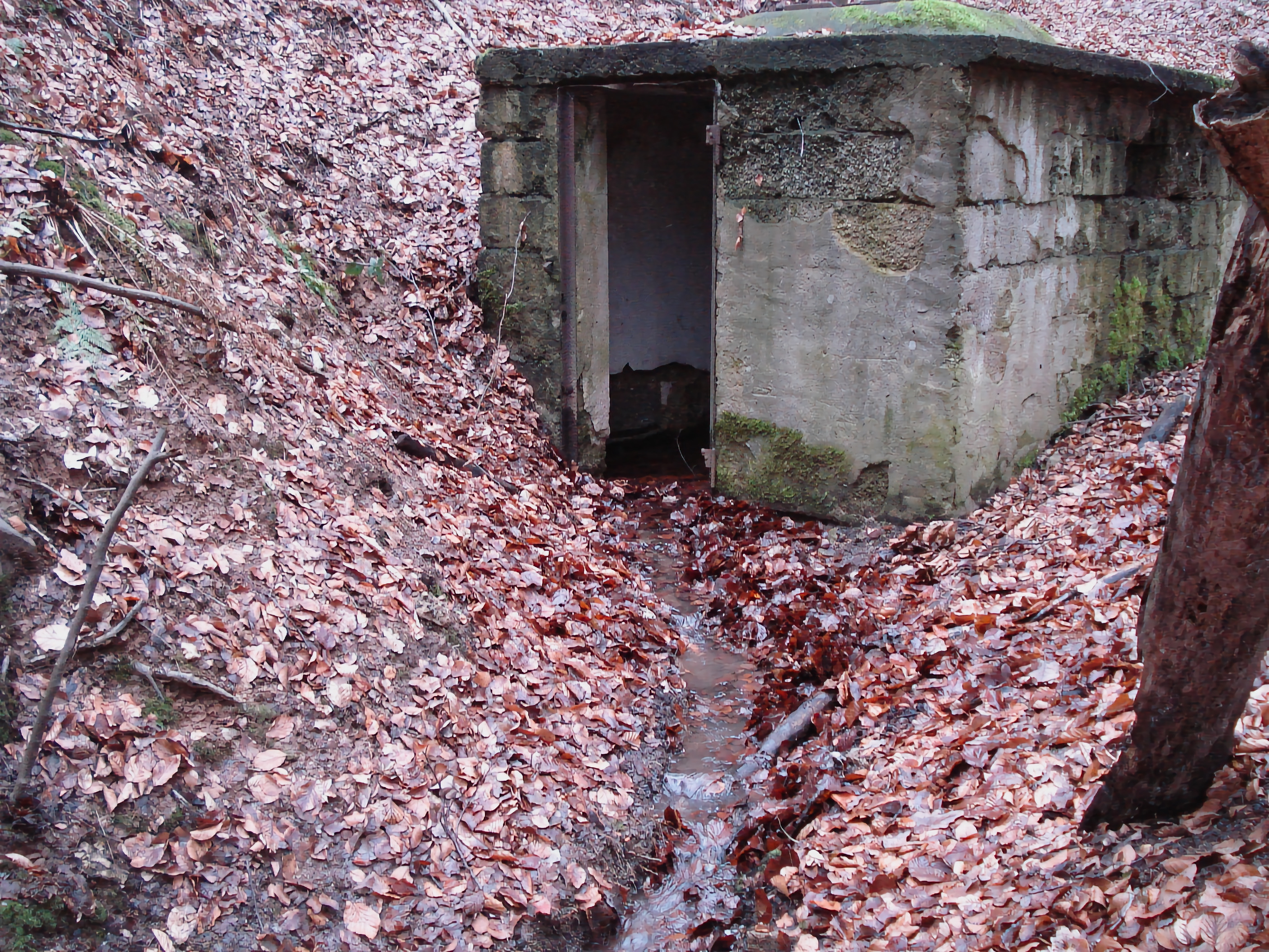 Der Born bei Oberschur. Ihm entspringt der Oberschurbach.